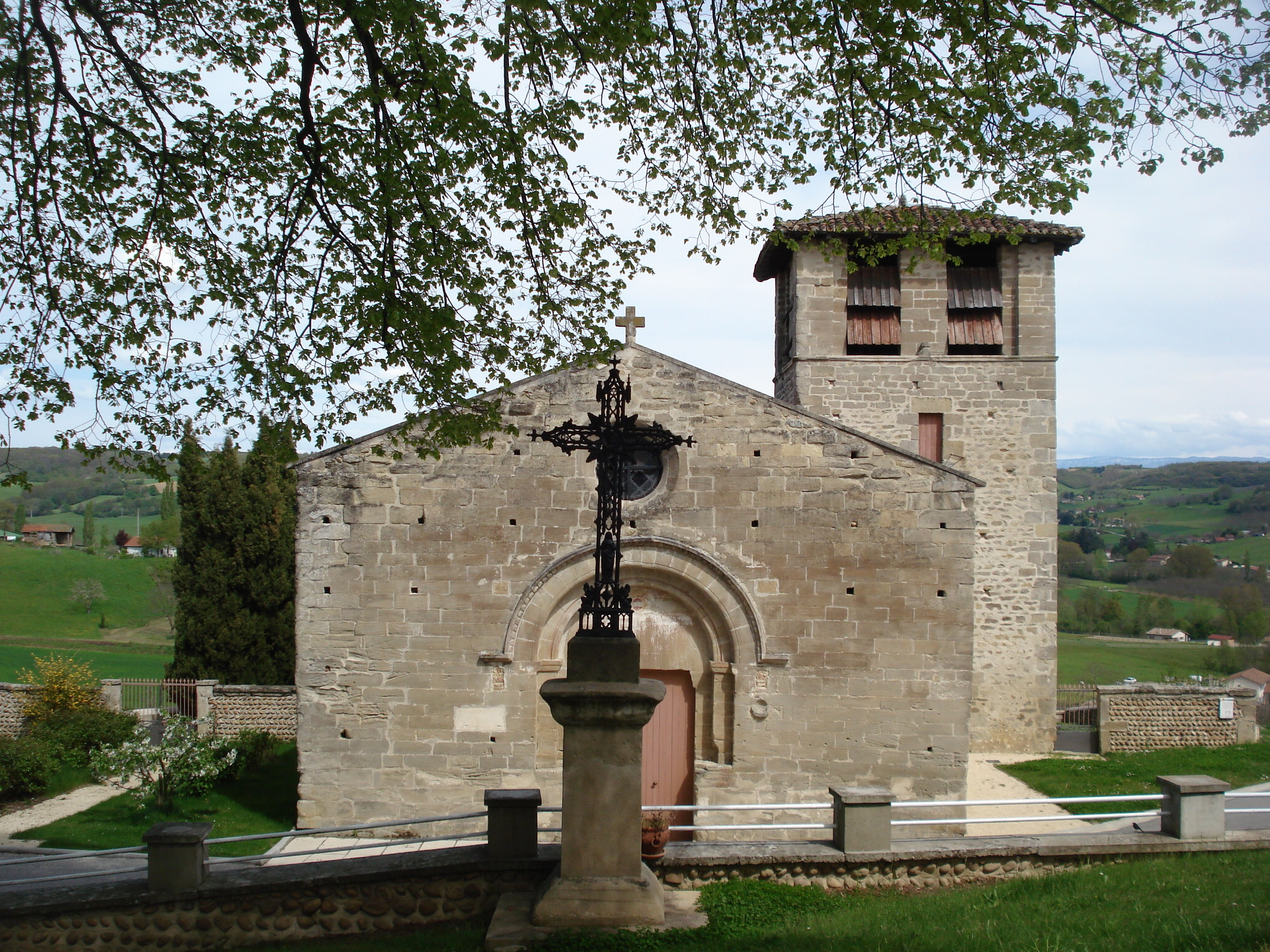 église Saint-Sever (XIIème siècle) à Miribel (Drôme)